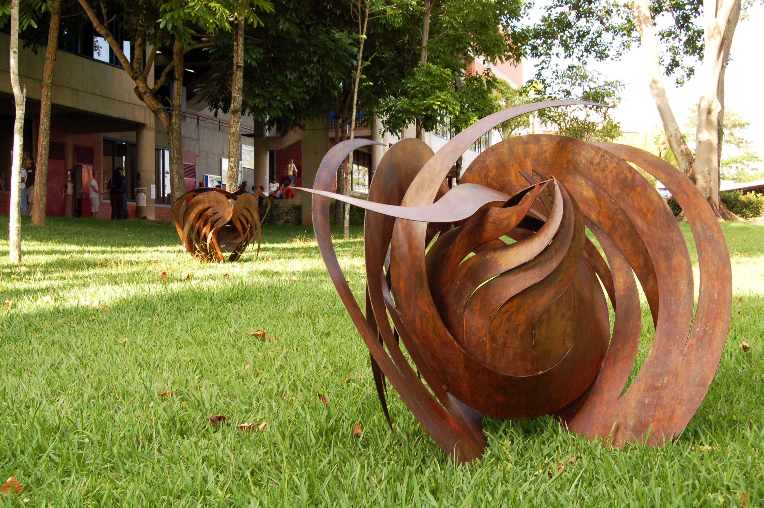 escultura del artista plástico Francisco Martínez. colección Universidad Metropolitana